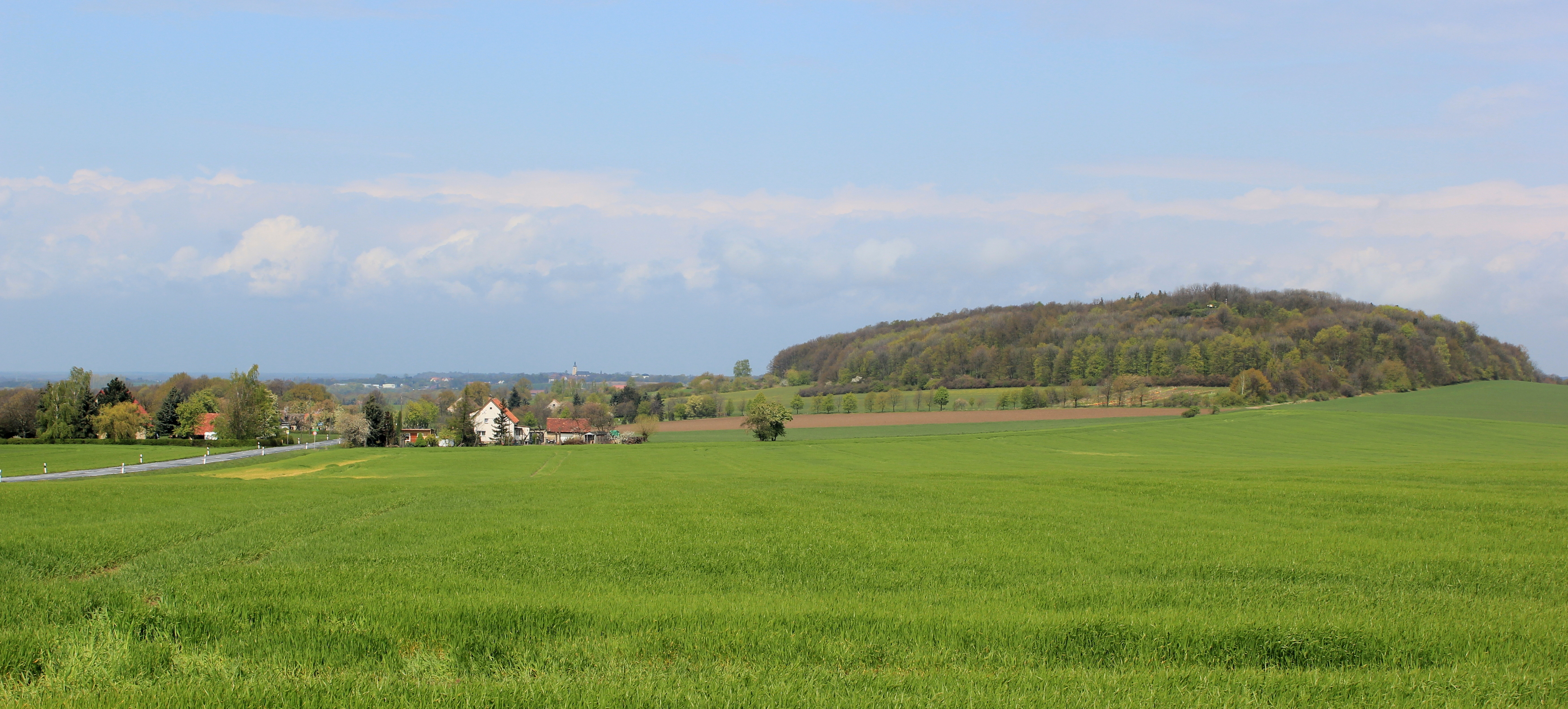 Hornjoserbsce: Wósmužowa hora z Hrodźišćom w pozadku.